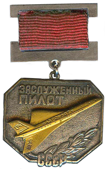 Знак «Заслуженный пилот СССР»